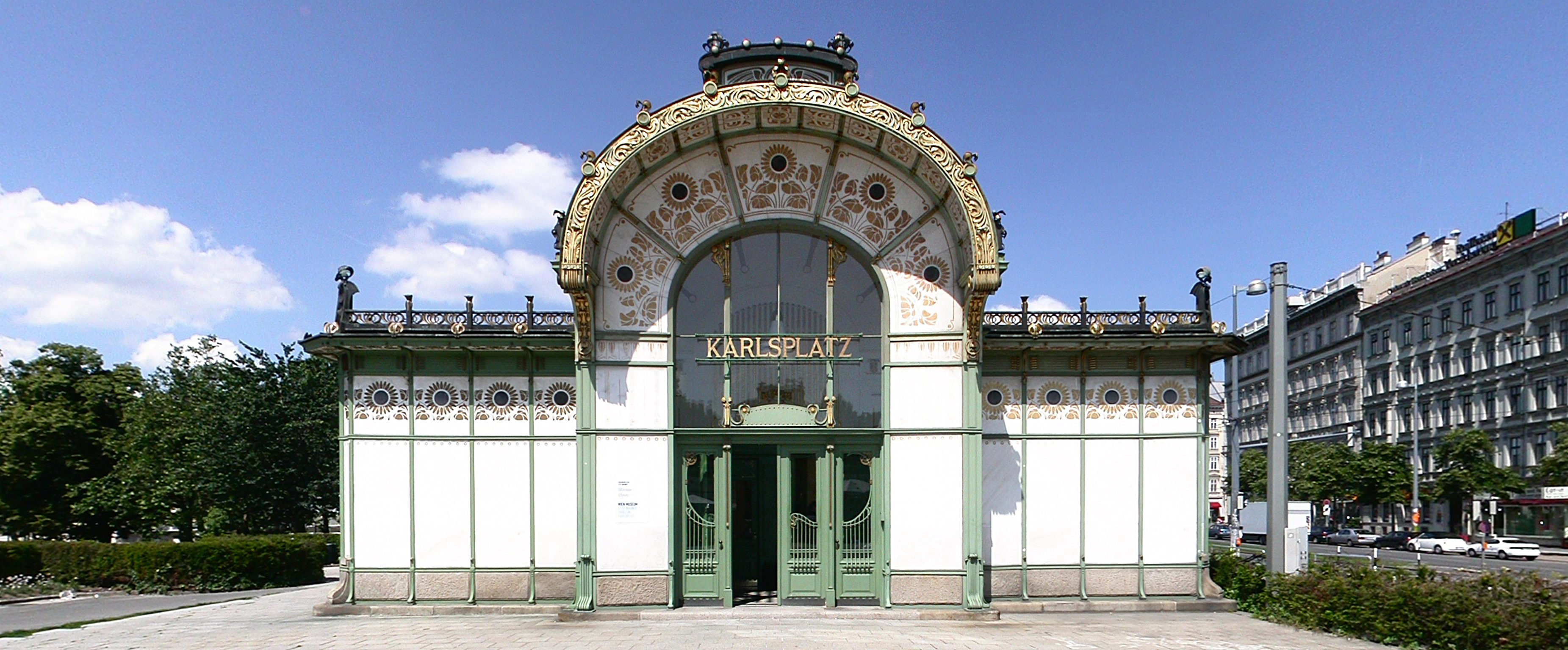 westlicher Otto Wagner Pavillon am Karlsplatz in Wien, Sommer, Tag, Blick Richtung Westen